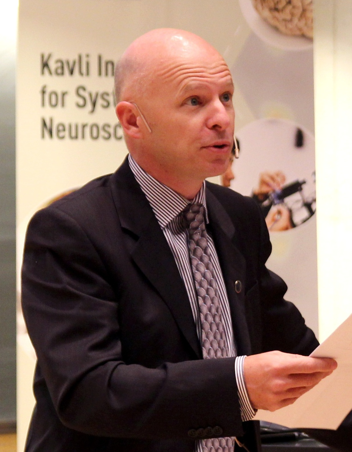 Stanislas Dehaene, Kavli Prize Committee in Neuroscience